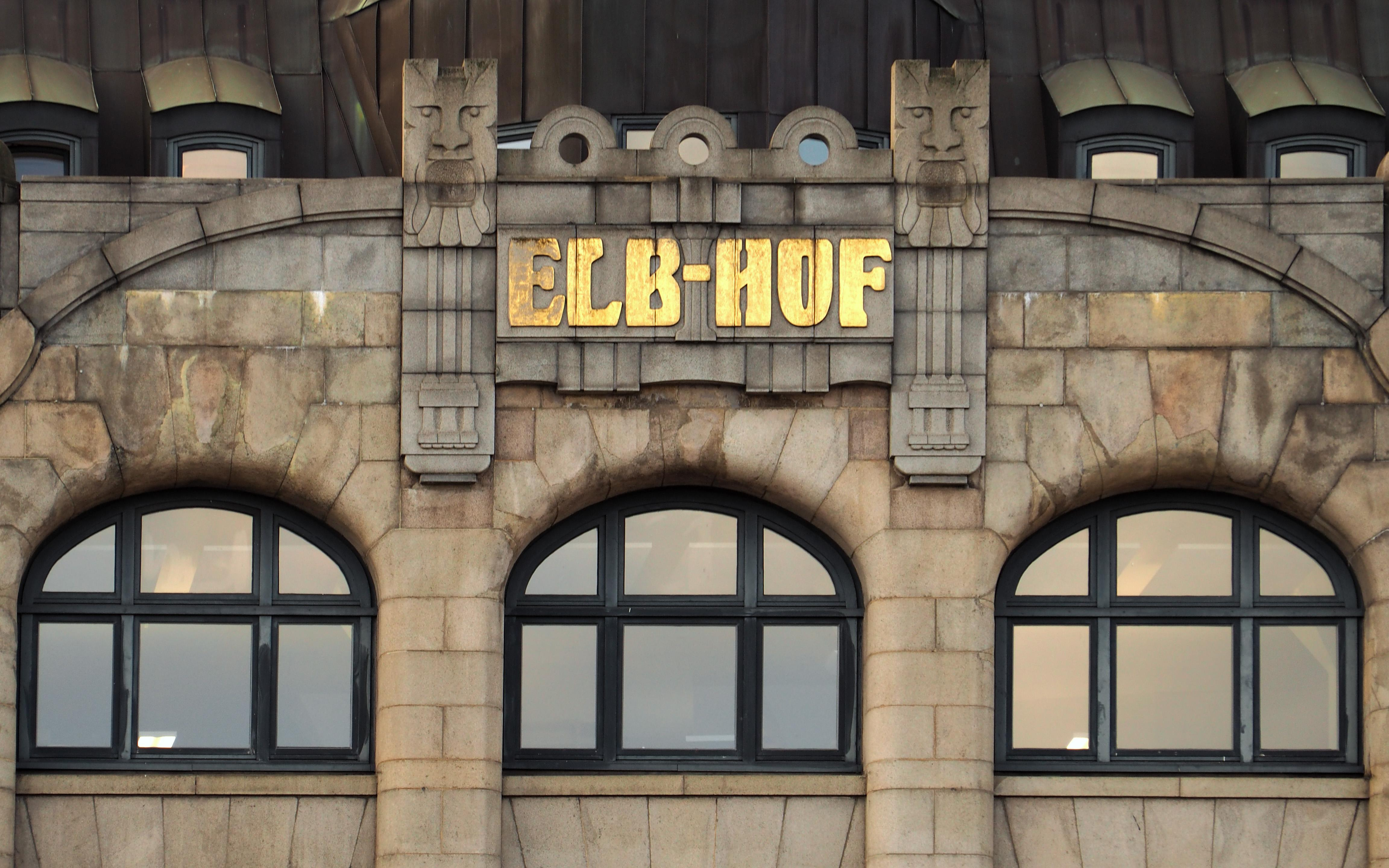 Hamburg, Kontorhaus Elbhof, Detail mit Schriftzug, Februar 2015 This is a photograph of an architectural monument.